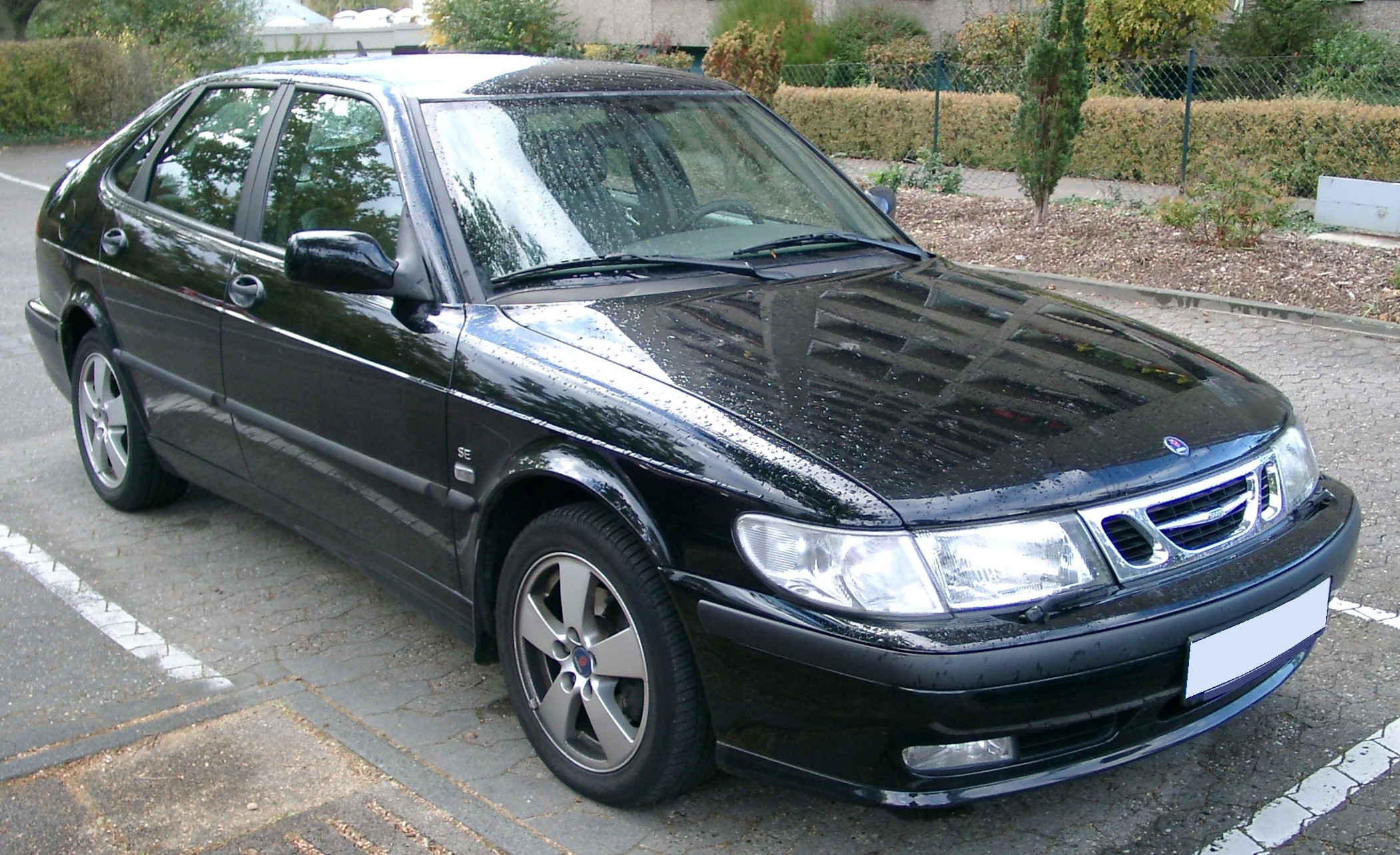 Saab 9-3